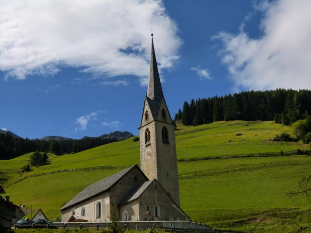 Pfarrkirche St. Nikolaus in Durnholz (Südtirol)